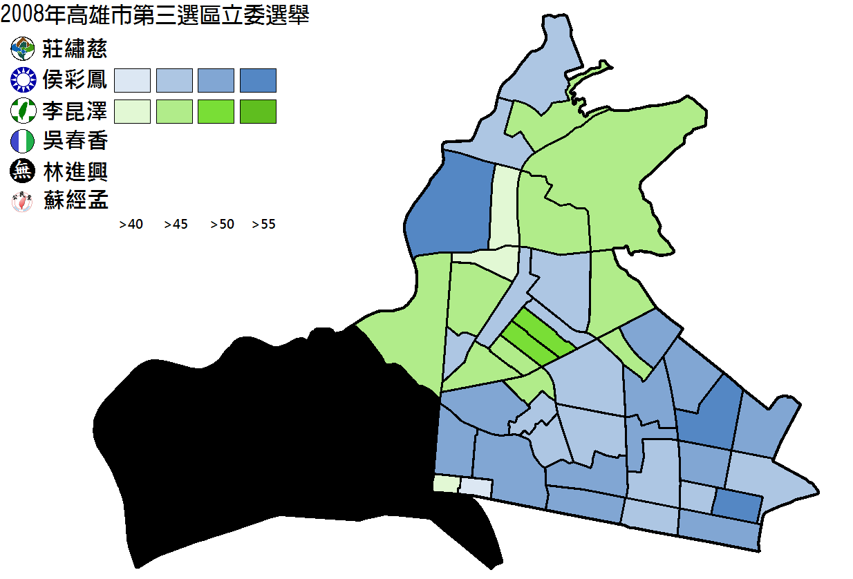 2008年高雄市第三選區立委選舉得票